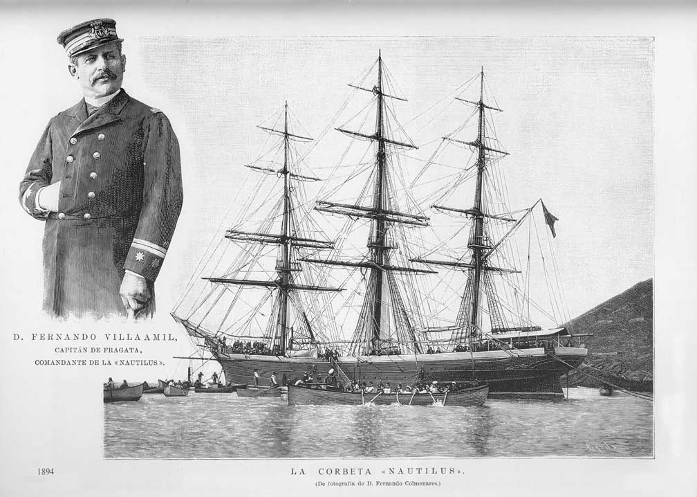 Xilografía de Fernando Villaamil y la Nautilus